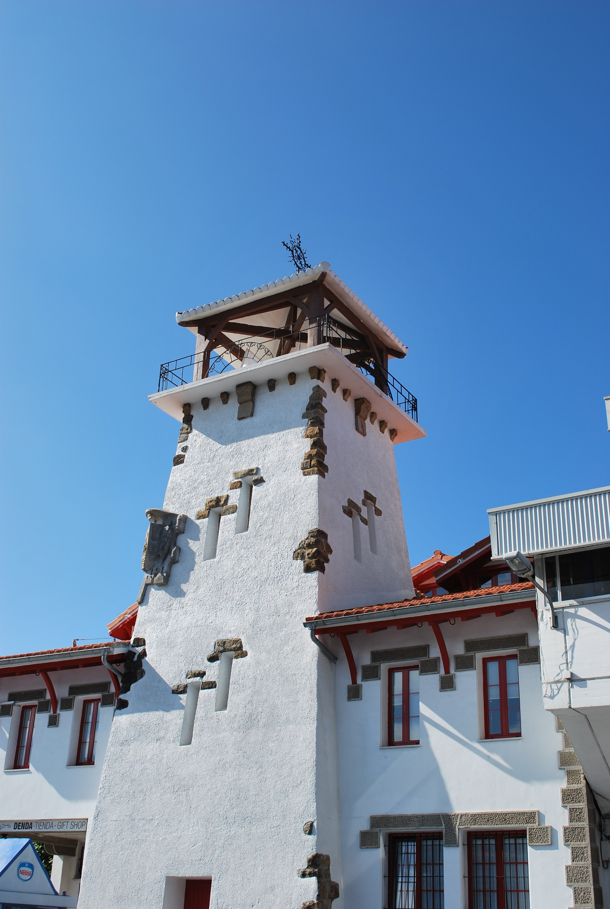 Bibliothèque municipale Bermeo (Biscaye).